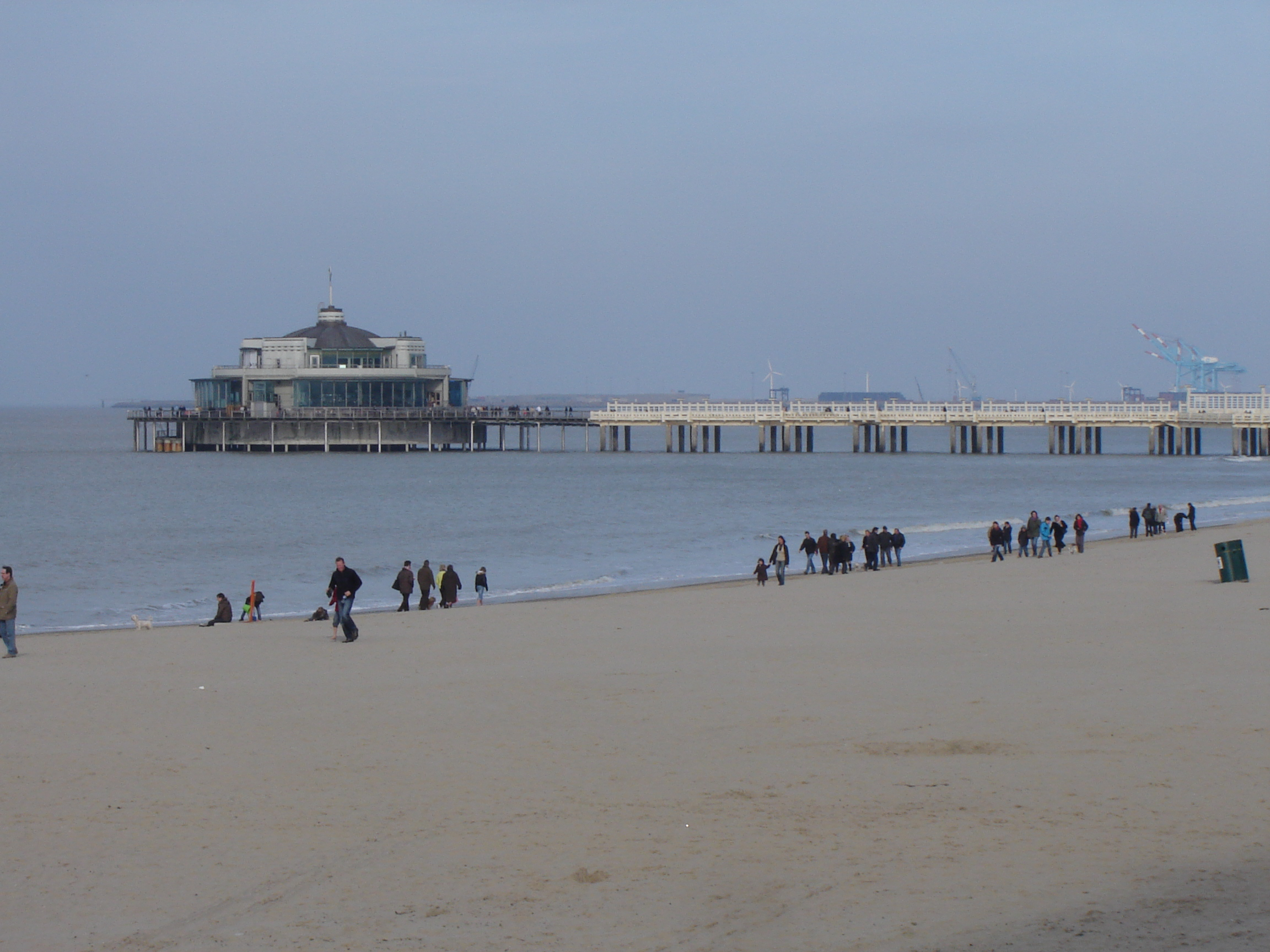 Pier en strand van Blankenberge. In de achtergrond de haven van ZeebruggePier and beach in Blankenberge. In the background the port of Zeebrugge. Blankenberge, West Flanders, Belgium